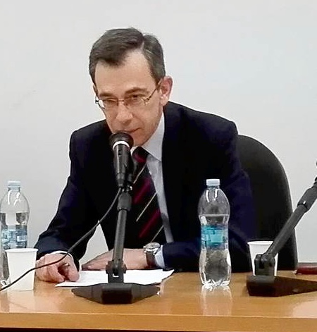 d